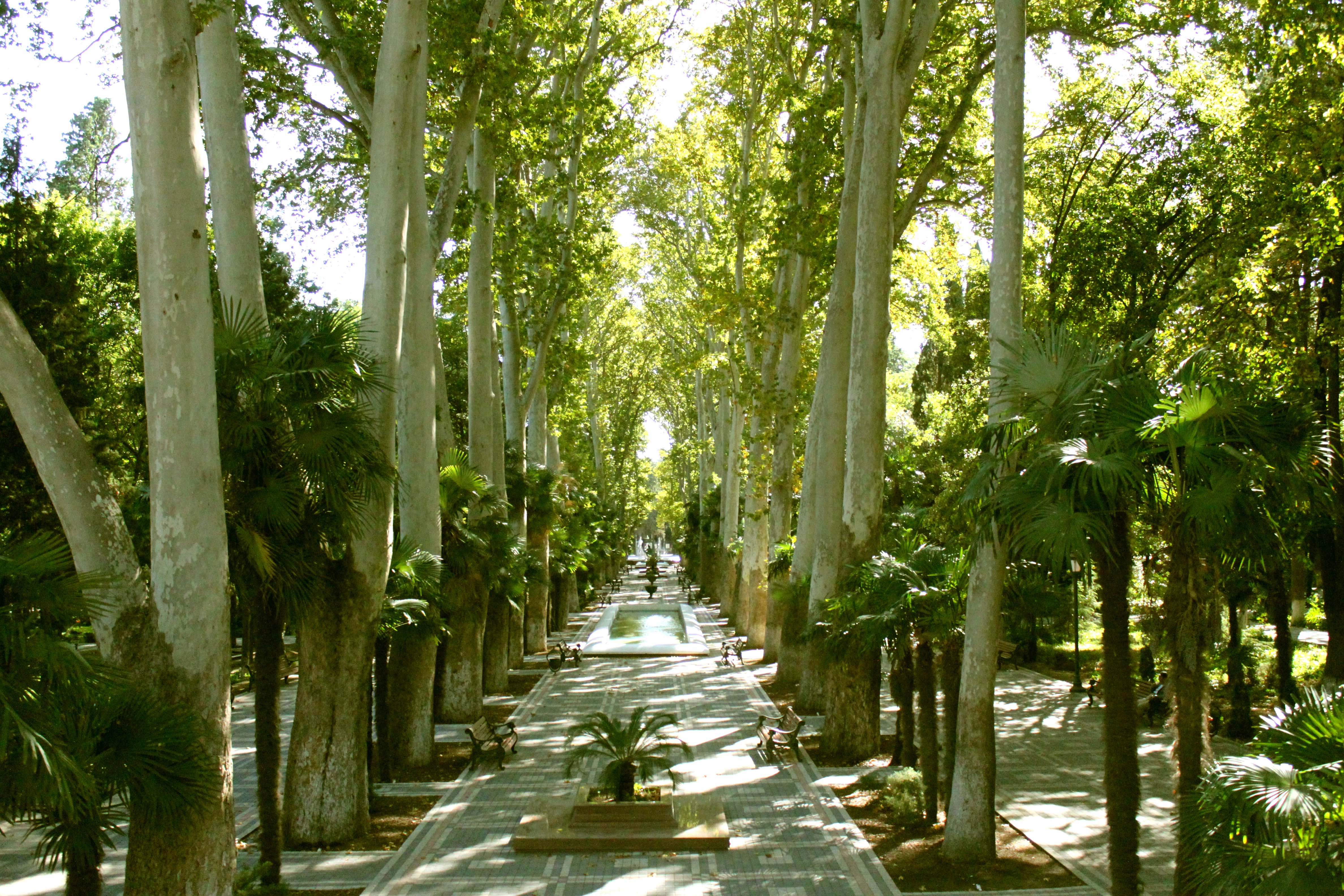 Gəncədə Xan bağı